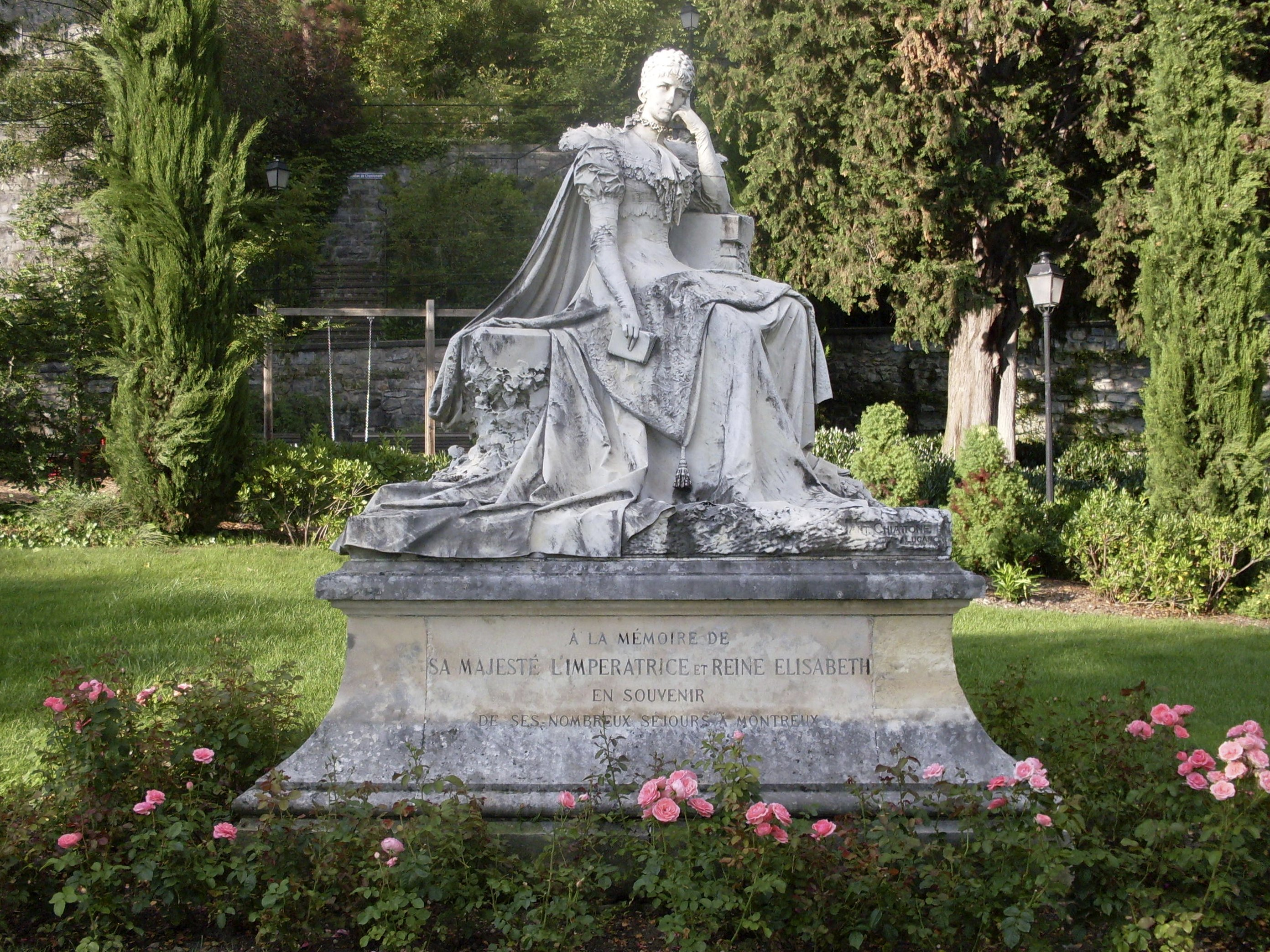 Impératrice Elisabeth, statue par Antonio Chiattone de 1902 - place des Roses, Montreux-Territet, Suisse. Inscription sur le socle A la mémoire de sa majesté l'impératrice et reine Elisabeth en souvenir de ses nombreux séjours à Montreux